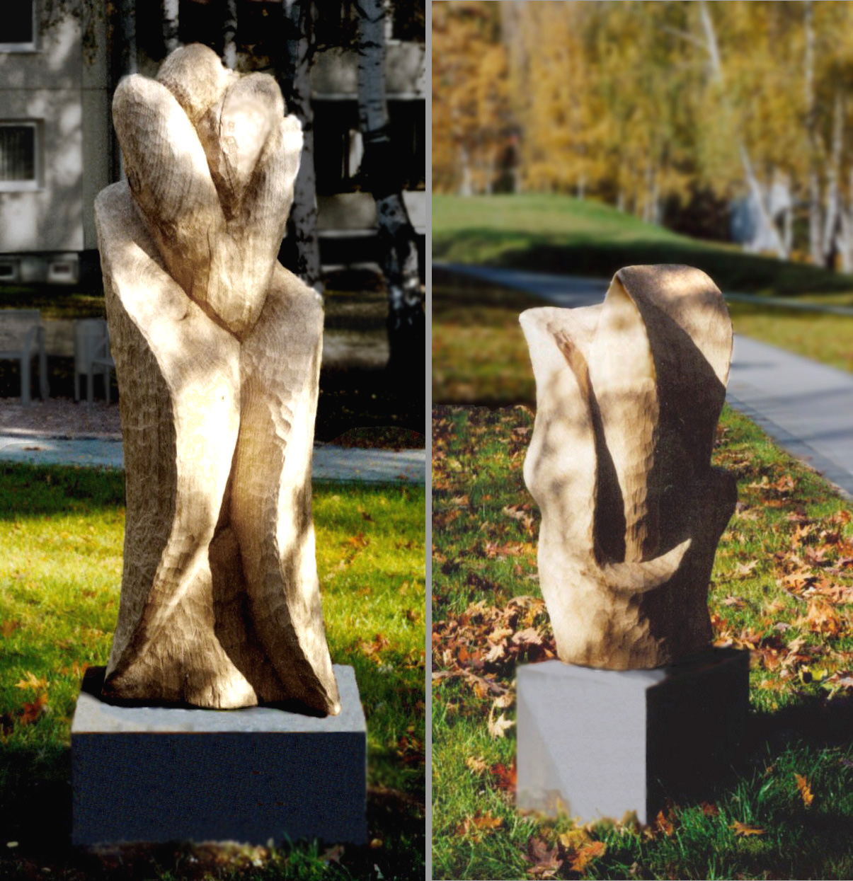 Florale Skulpturen von Guido Schenkendorf in einem Park von Bad Belzig (Land Brandenburg), Fotos: Bernd Maywald